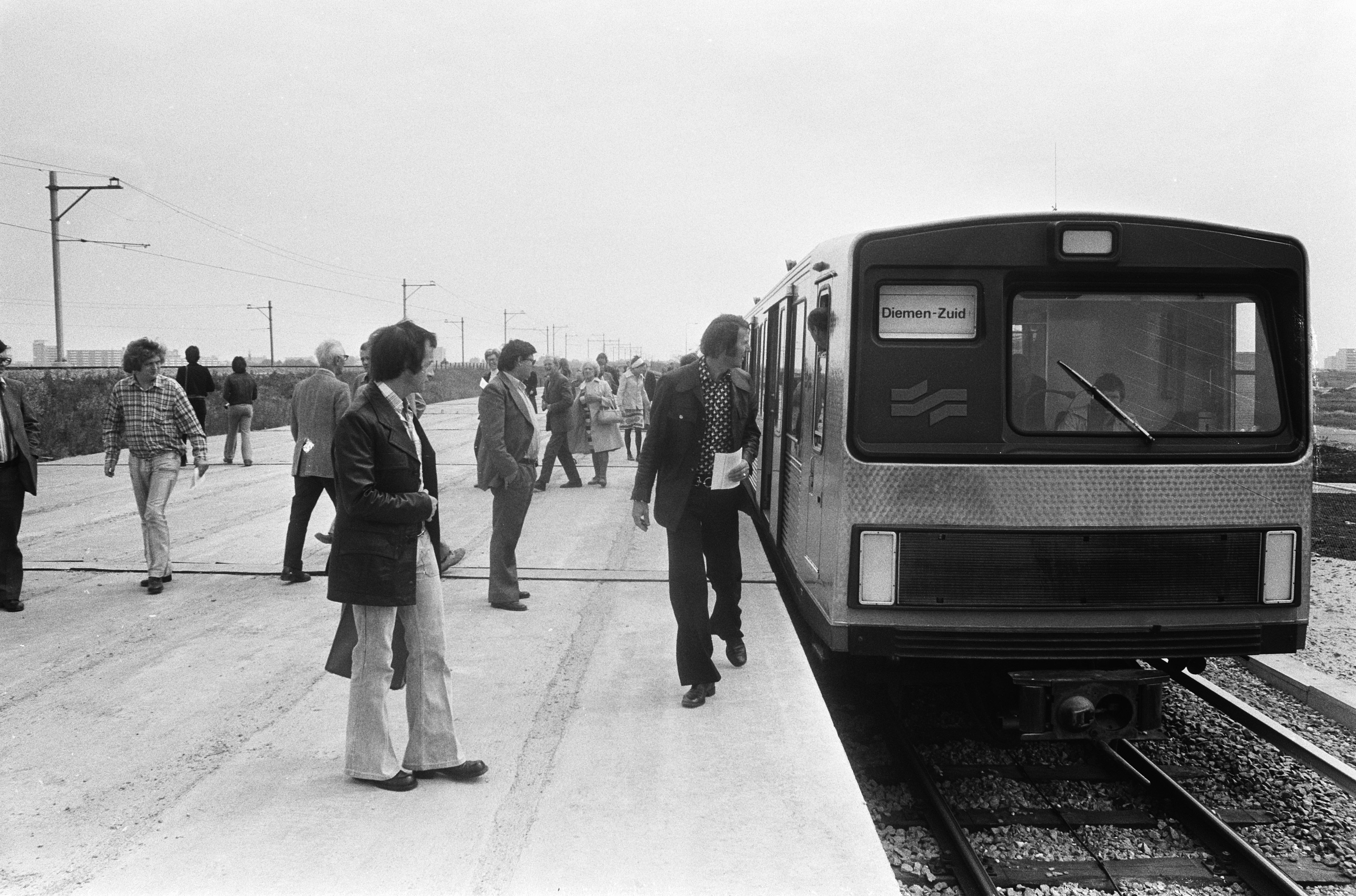 Collectie / Archief : Fotocollectie Anefo Reportage / Serie : [ onbekend ] Beschrijving : Amsterdammers maken een ritje met de metro in de Bijlmermeer; reizigers bij het in- en uitstappen Datum : 14 juni 1975 Locatie : Amsterdam, Noord-Holland Trefwoorden : metro's, reizigers Fotograaf : Peters, Hans / Anefo Auteursrechthebbende : Nationaal Archief Materiaalsoort : Negatief (zwart/wit) Nummer archiefinventaris : bekijk toegang 2.24.01.05 Bestanddeelnummer : 927-9882